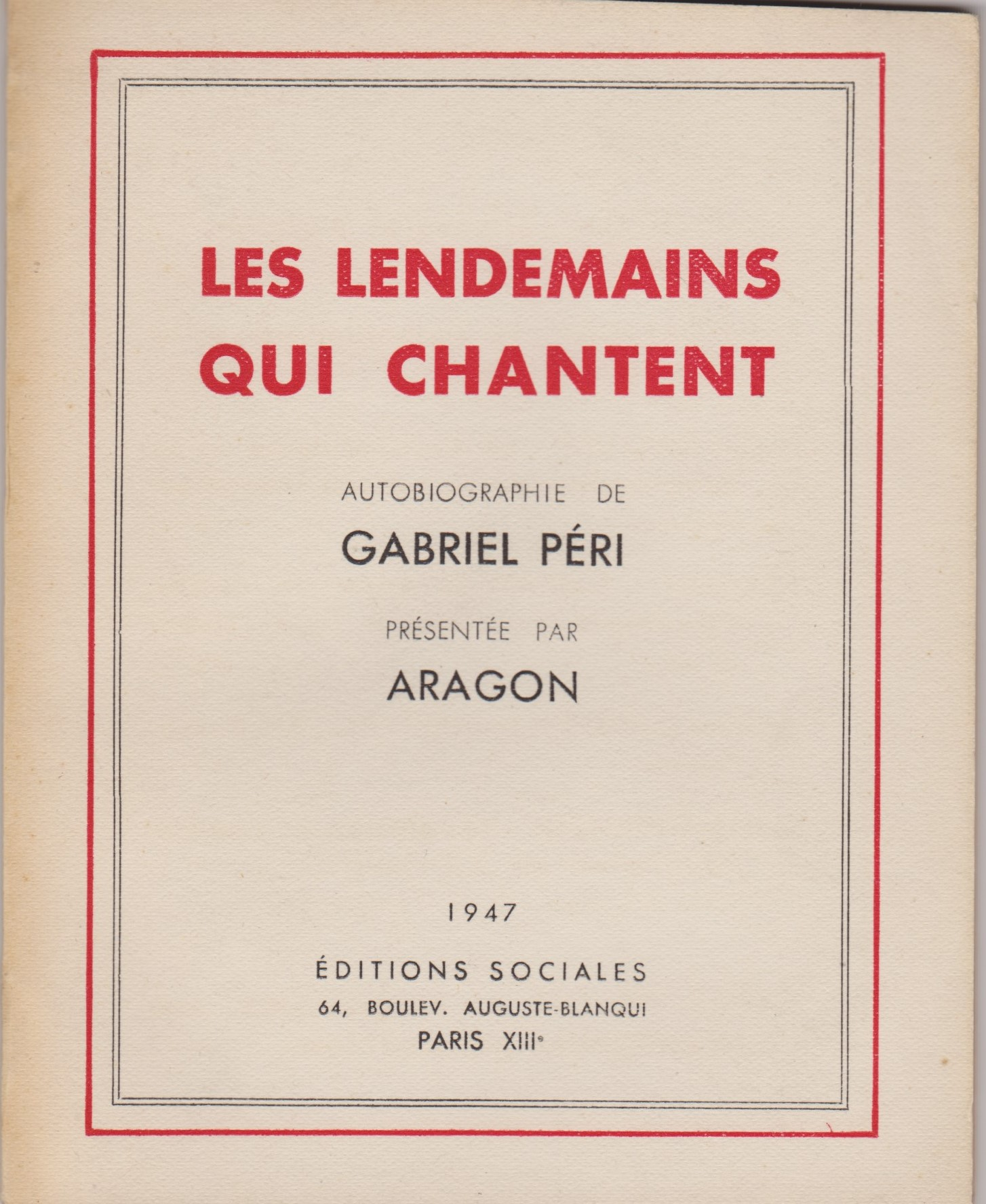 Brochure au format 15 x 12 cm, de 62 pages, publiée en 1947 par les éditions sociales, à Paris. Le texte de Louis Aragon, pages 7-21 " La passion de Gabriel Péri " précède le texte de Gabriel, "Ma vie", écrit en prison, peu avant qu'il soit fusillé le 15 décembre 1941.